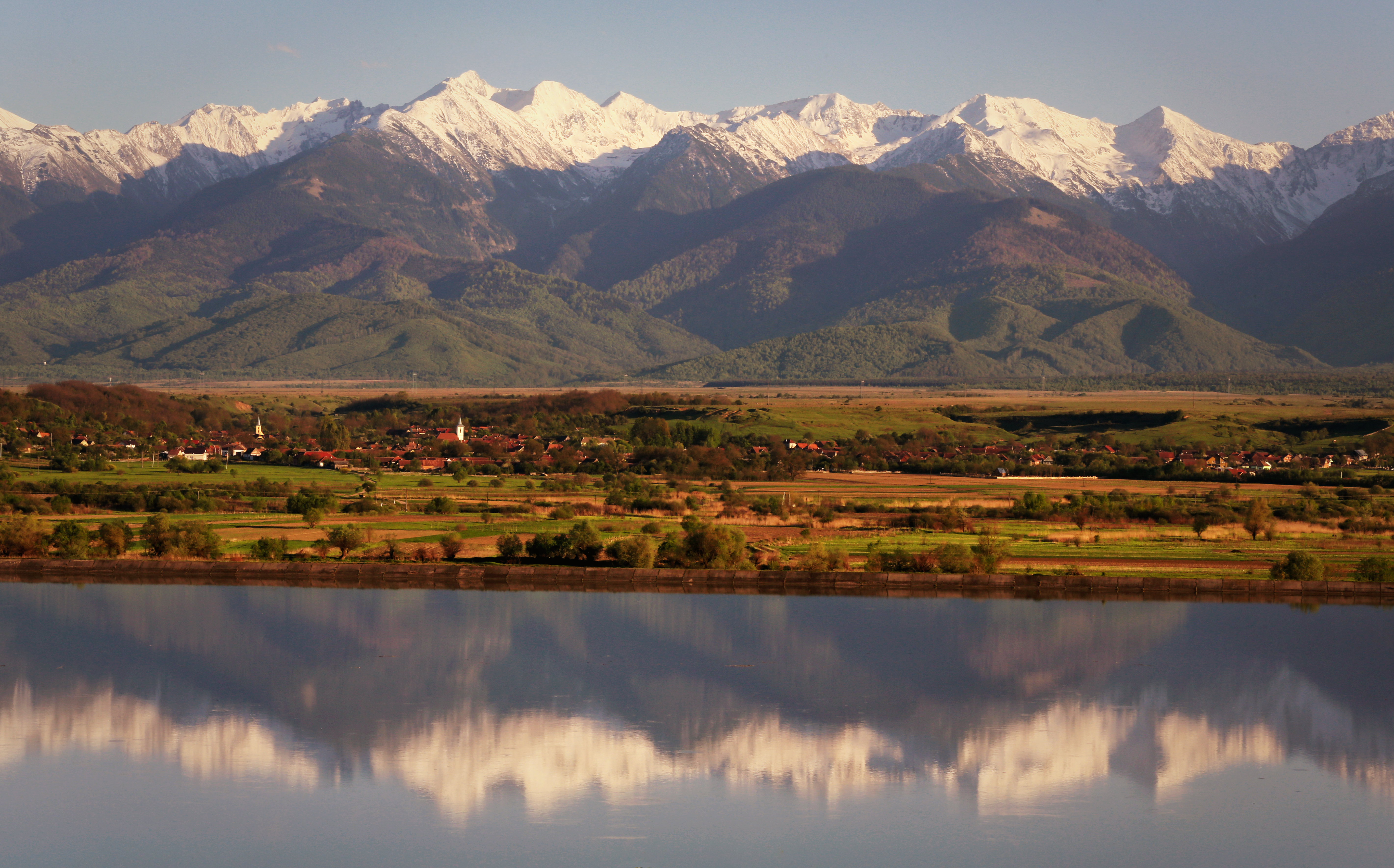 Biserica „Adormirea Maicii Domnului”, cu turnul